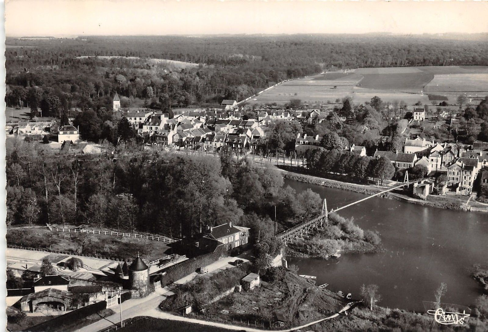 Carte postale ancienne n°36672 "Vue aérienne sur le vieux Moulin et Vallée de la Marne". La passerelle remplace provisoirement le pont détruit pendant la seconde guerre mondiale par les soldats Français.